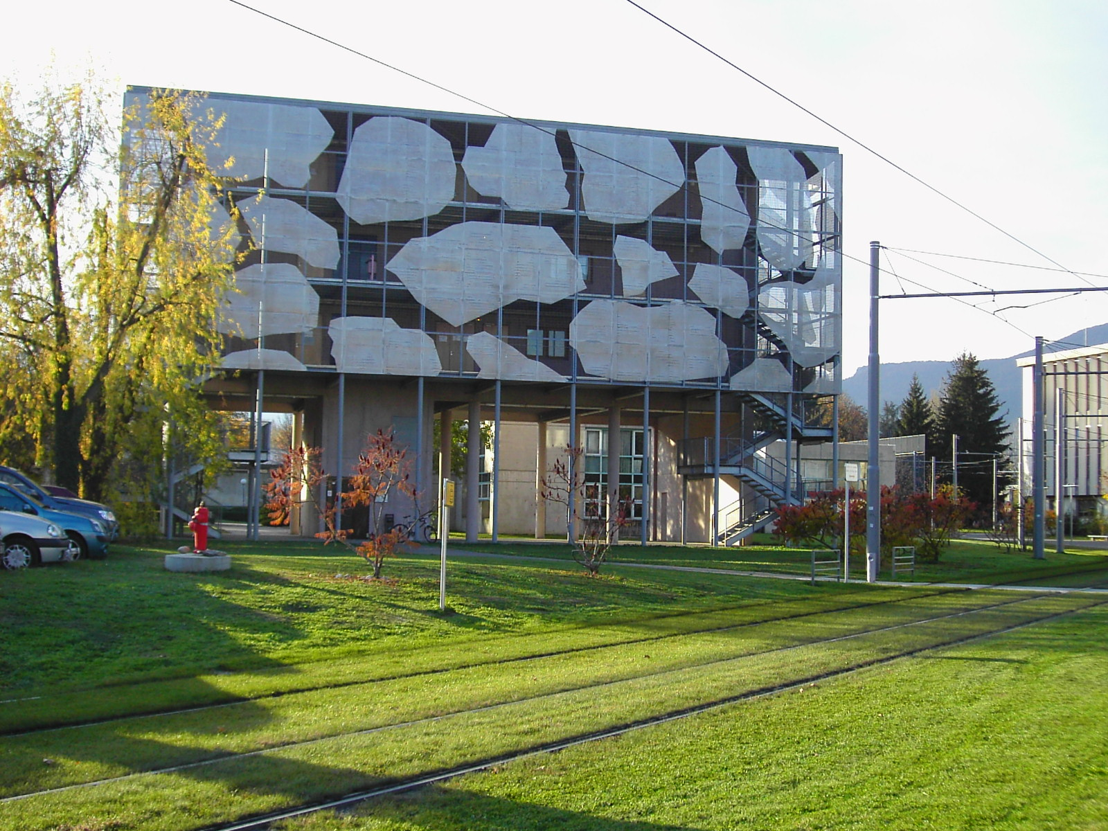 Batiment université Pierre Mendes France - campus Grenoble